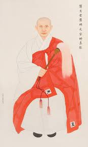 Thiền sư Hàn Quốc hiện đại